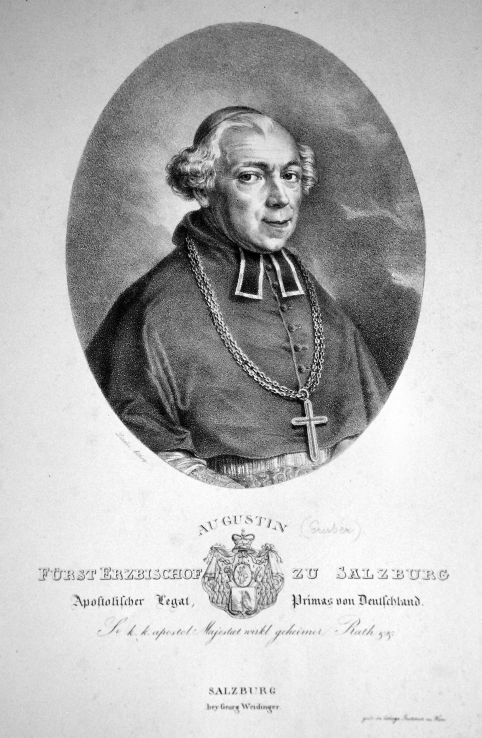 Augustin Johann Joseph Gruber (1763-1835) Bischof von Laibach, Erzbischof von Salzburg. Lithographie von Friedrich Lieder um 1830